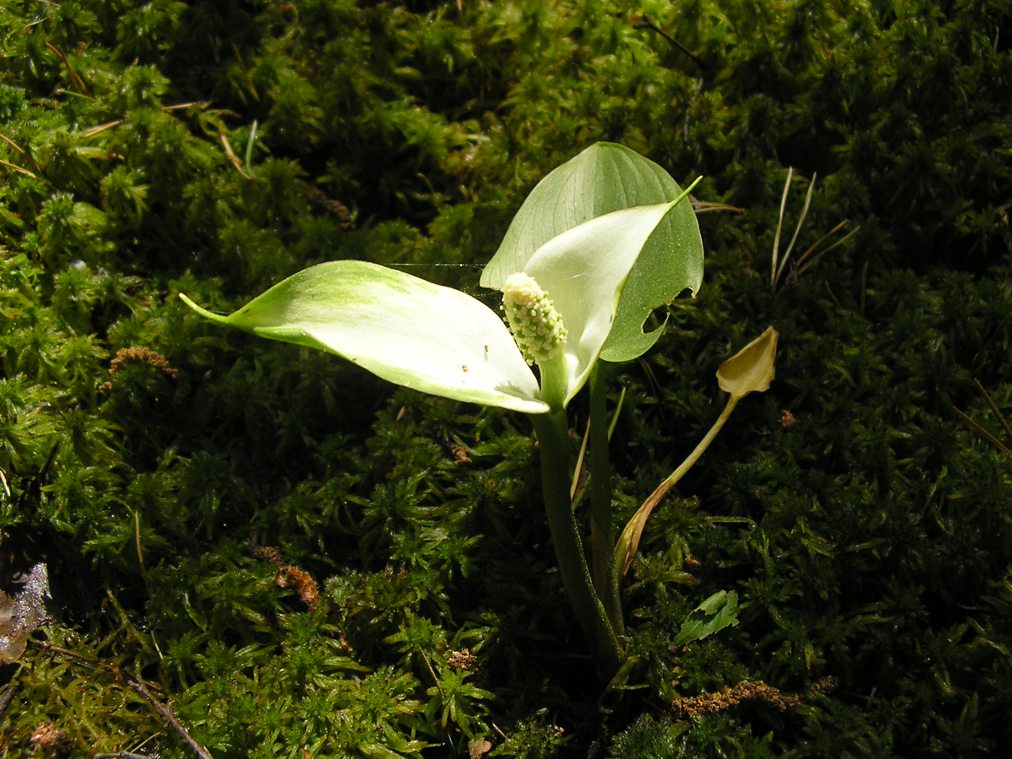 Soovõhk (Calla palustris) õõtsiksoos